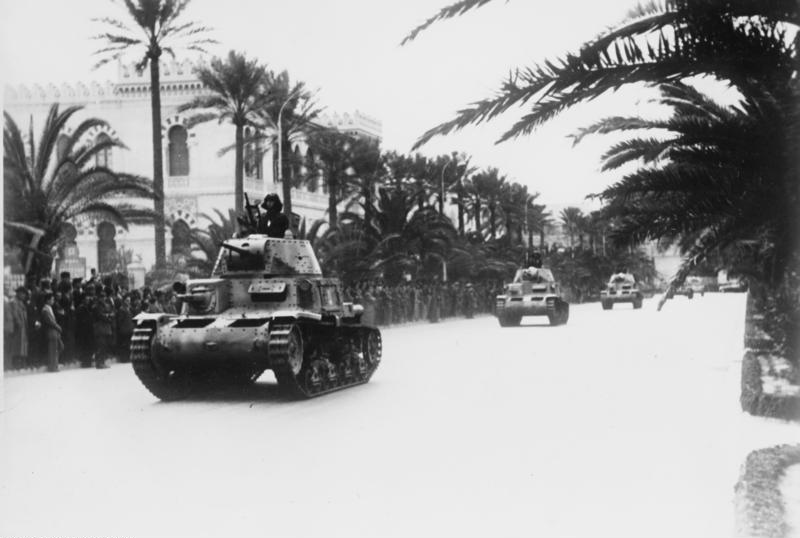 carri armati italiani del Regio Esercito (modello M13/40) durante una parata a Tripoli Nordafrika, Truppenparade in Tripolis Kampf in Nordafrika: Italienische Panzer bei der grossen Parade in Tripolis vor dem deutschen General Rommel. PK-Aufnahme: Kriegsberichter: Sturm (Sch.) 3377-41 "Fr." "Fr.OKW" März 41